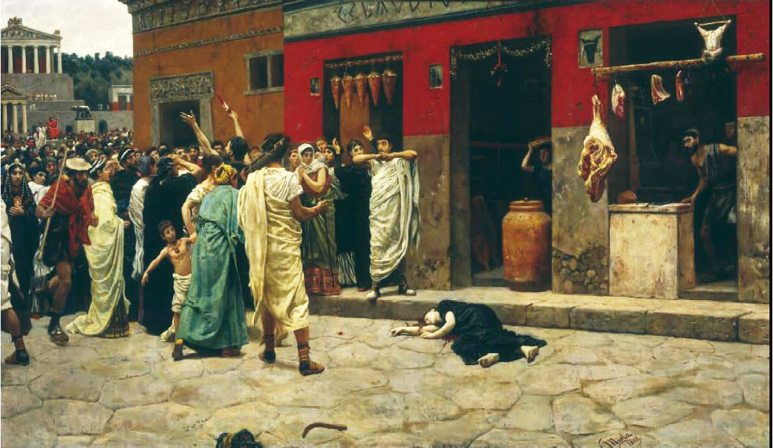 Uccisione di Virginia by Camillo Miola (1882). Napoli, Museo di Capodimonte.